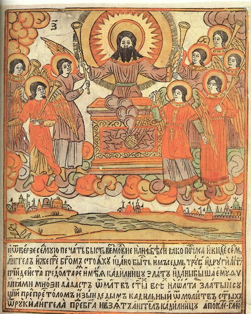 "БИБЛИЯ ДЛЯ БЕДНЫХ" (1692-1696 гг.) ВАСИЛИЯ КОРЕНЯ.